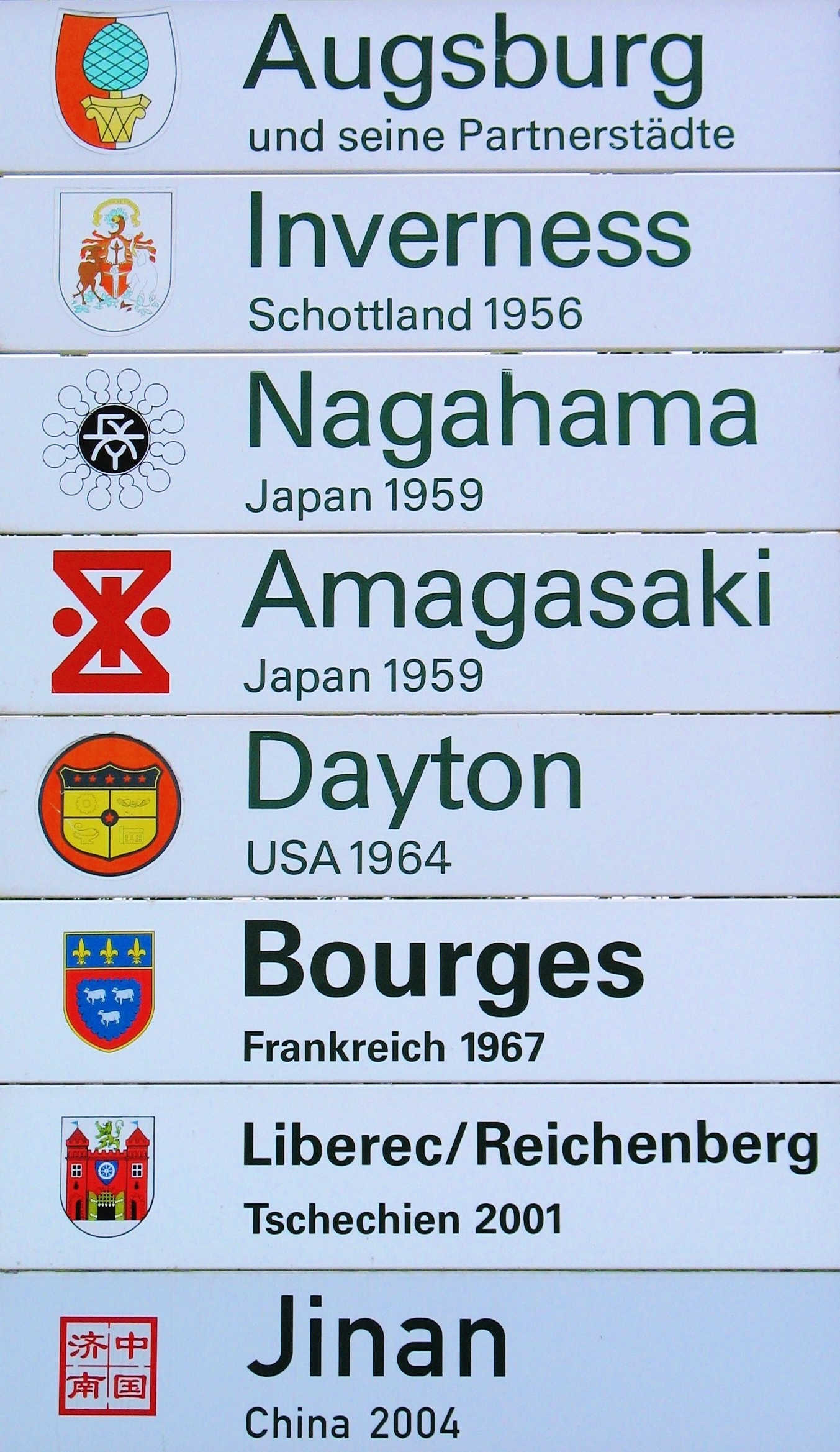 Augsburgs Städtpartner